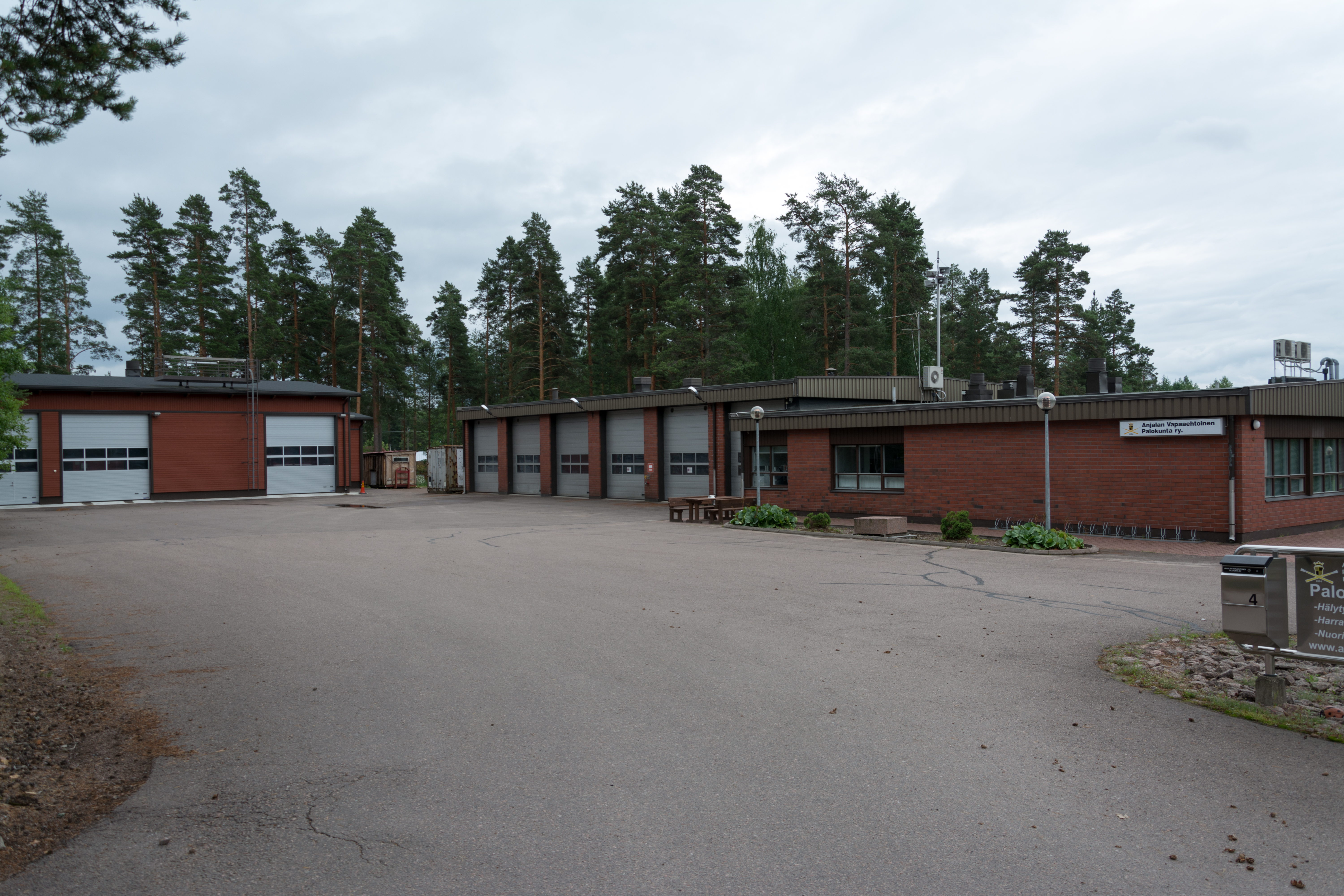 Anjalan VPK:n rakennus Kouvolassa